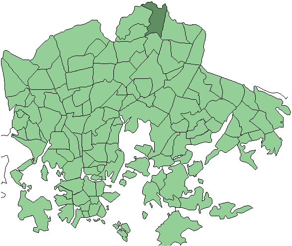 Districts of Helsinki, Tapulikaupunki highlighted